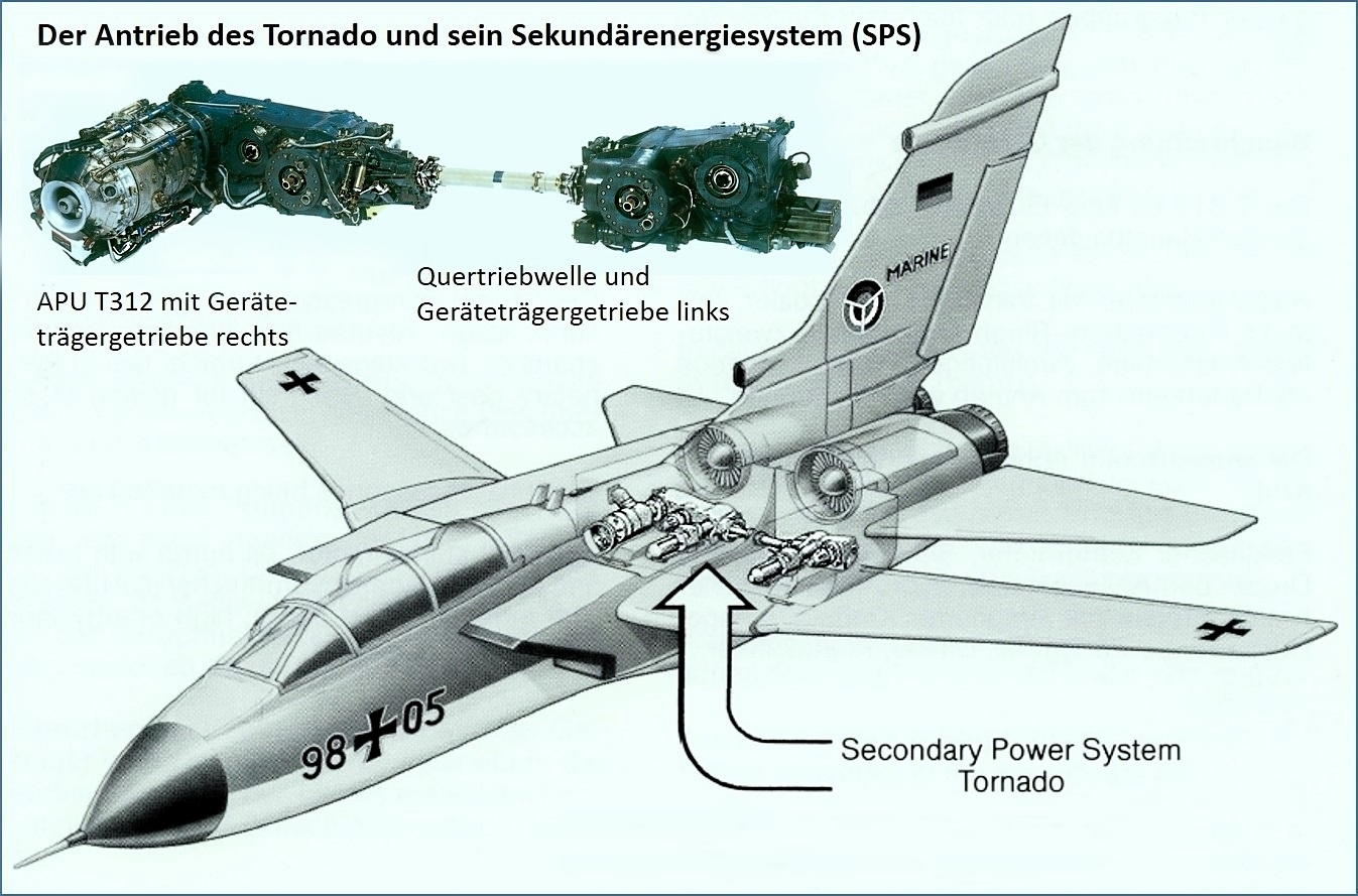 Position des Secondary Power Systems im Tornado